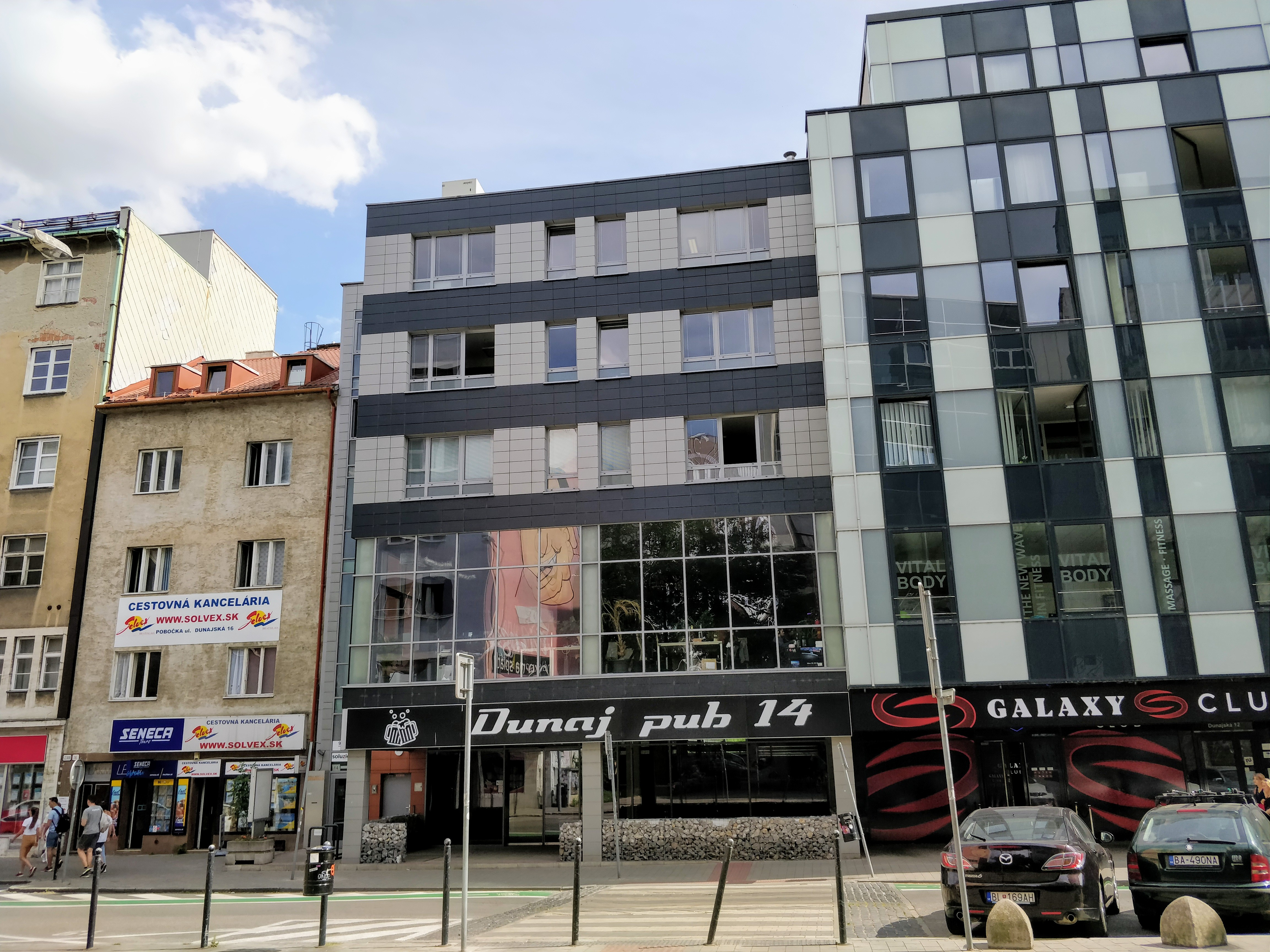 Dunajská 14, Bratislava